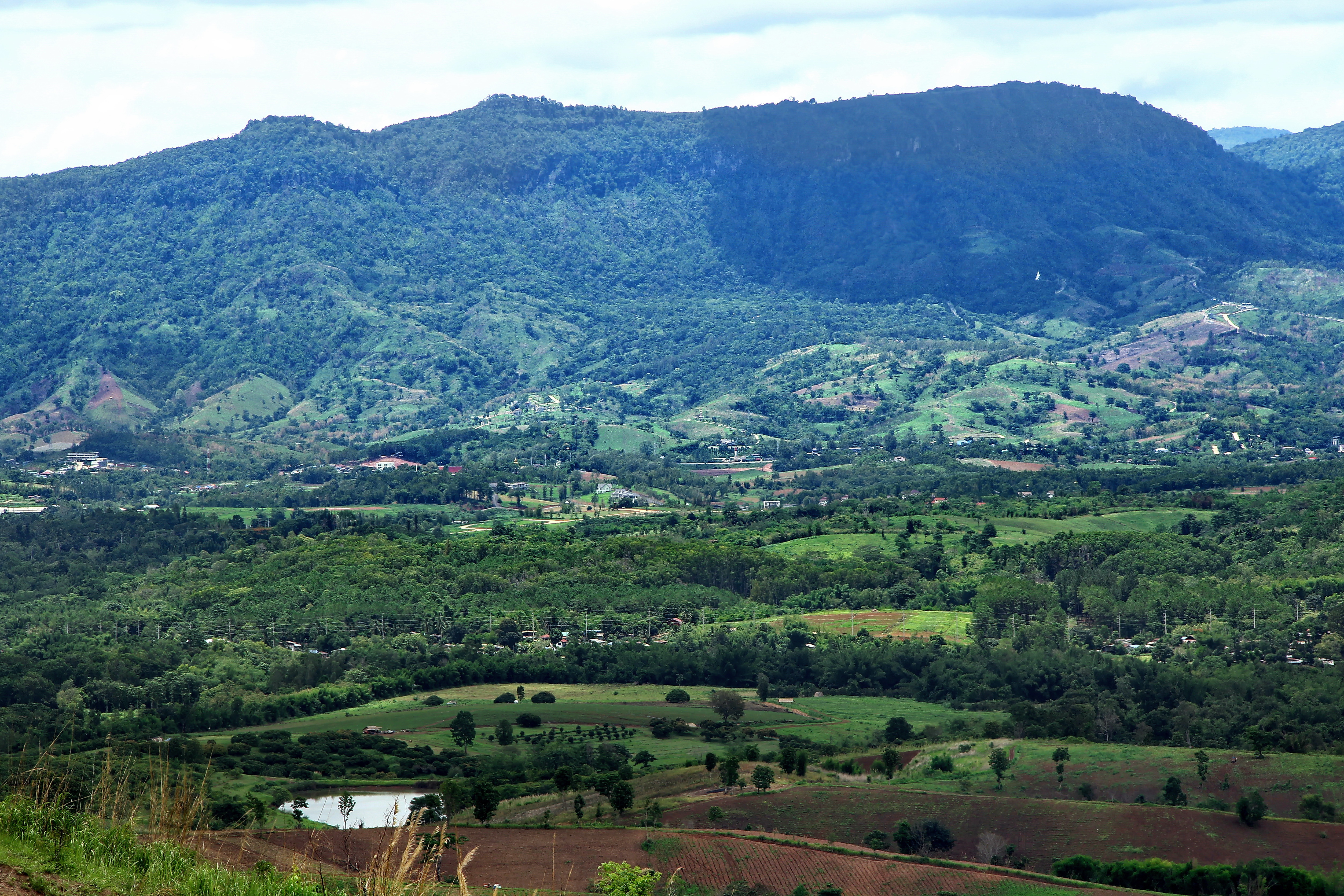 อุทยานแห่งชาติเขาค้อ